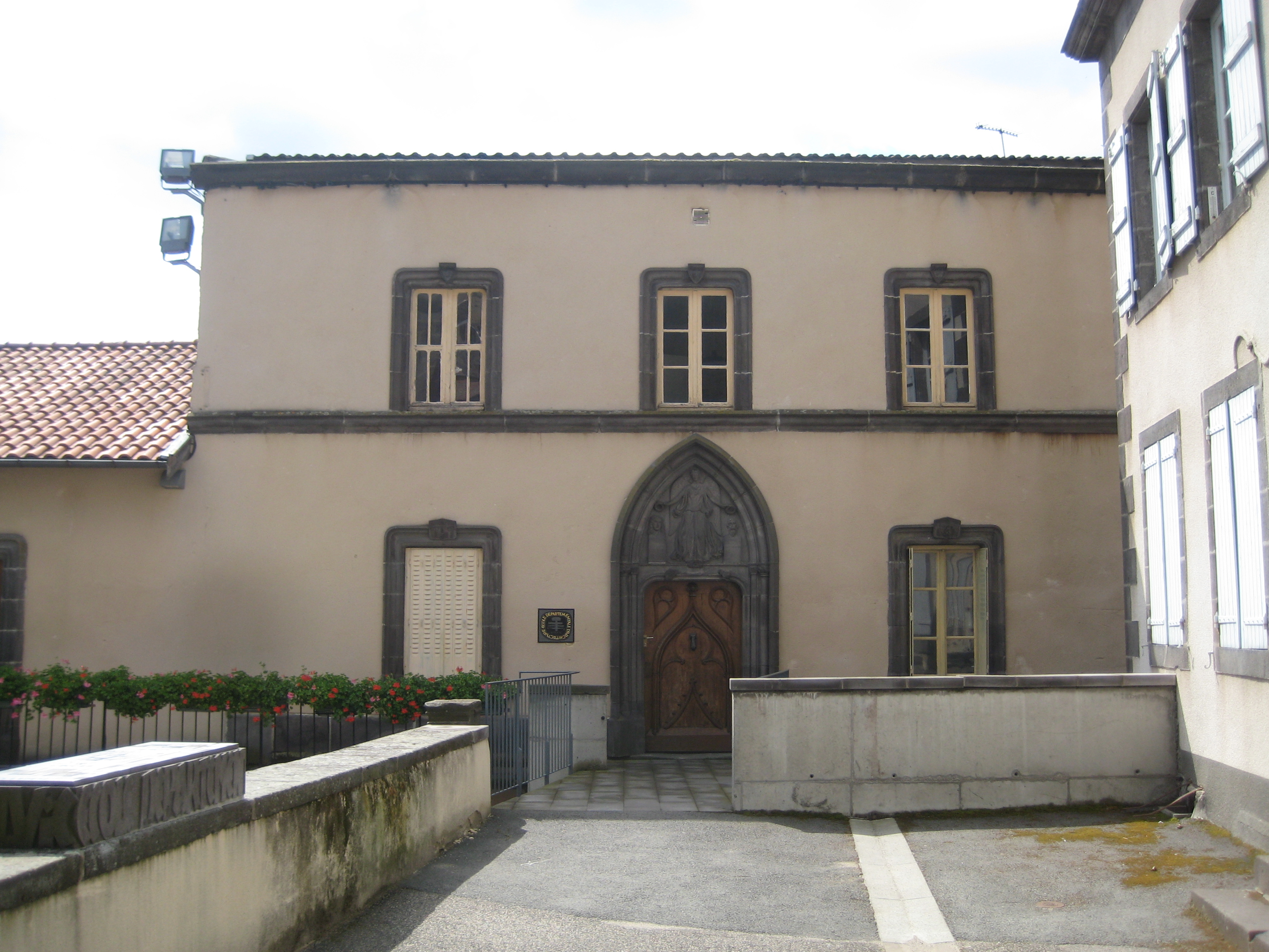 Ecole d'architecture de Volvic